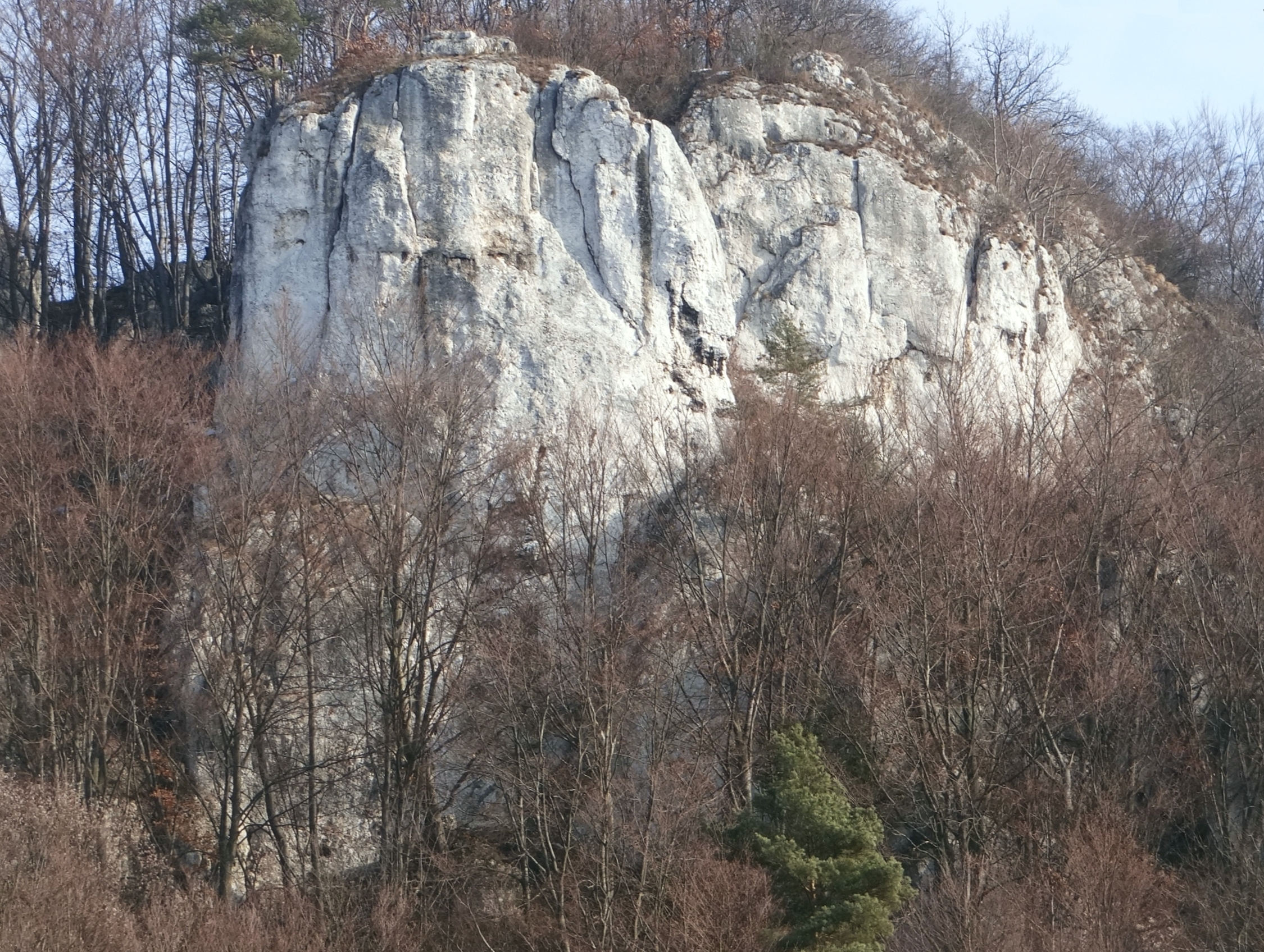 Wysoka. Widok z dna Doliny Będkowskiej